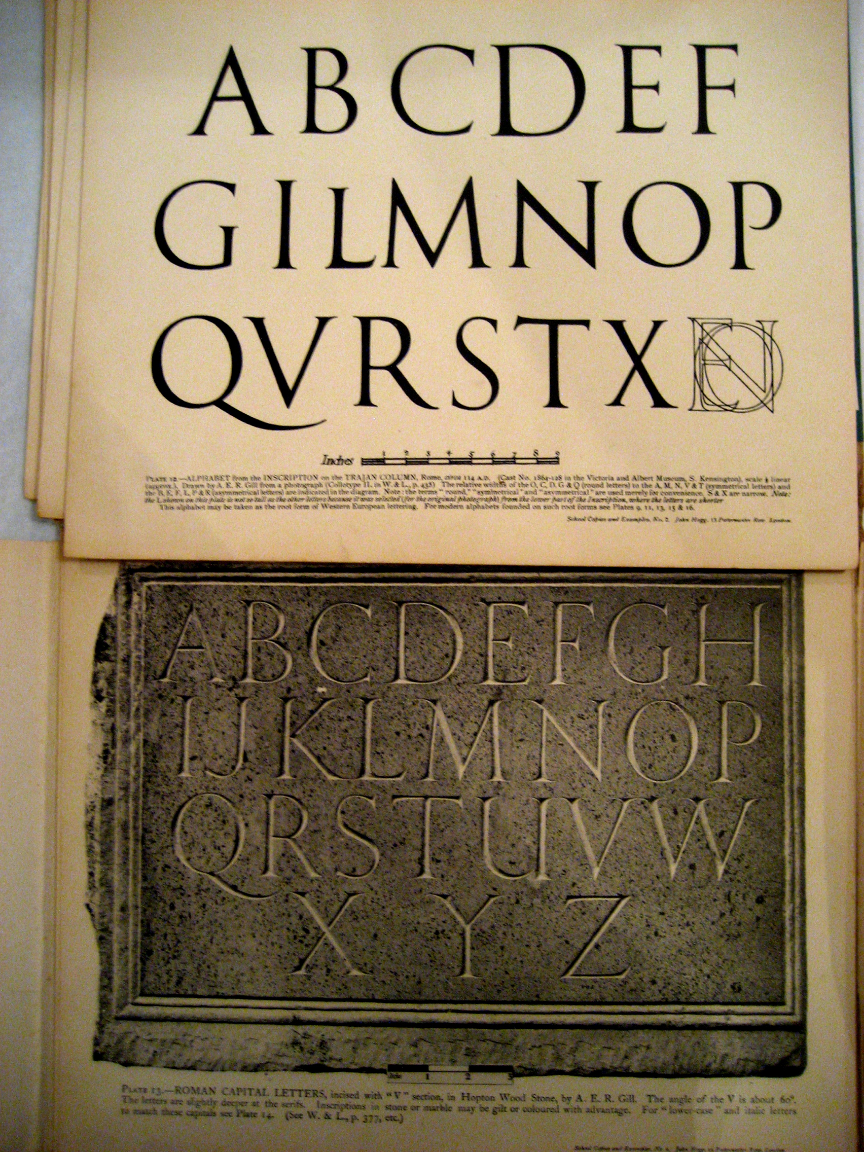 Trajan